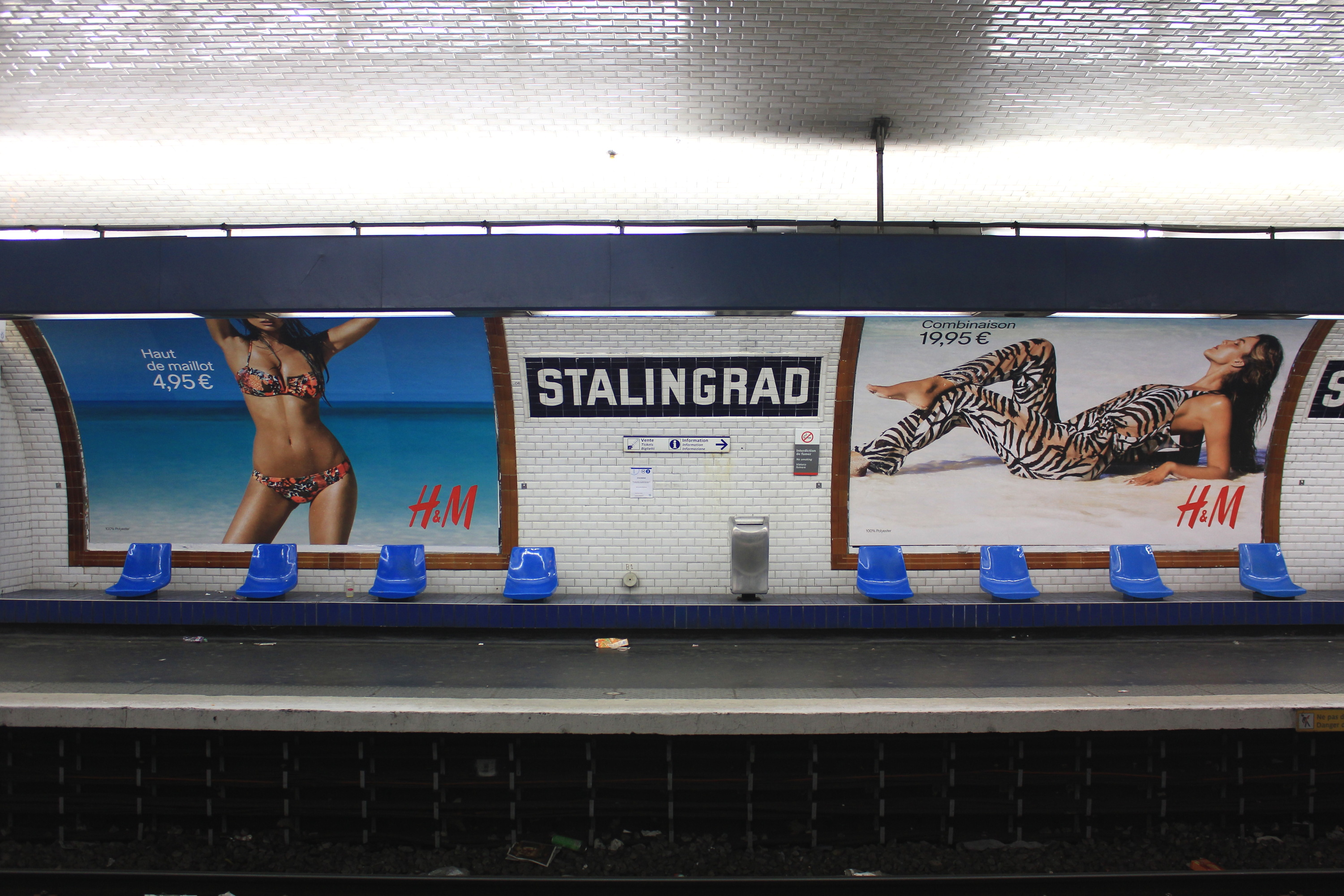 Quai de la station Stalingrad de la ligne 5 du métro de Paris, direction Bobigny.